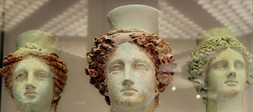 Teste della dea Kore, Siracusa, museo archeologico Paolo Orsi